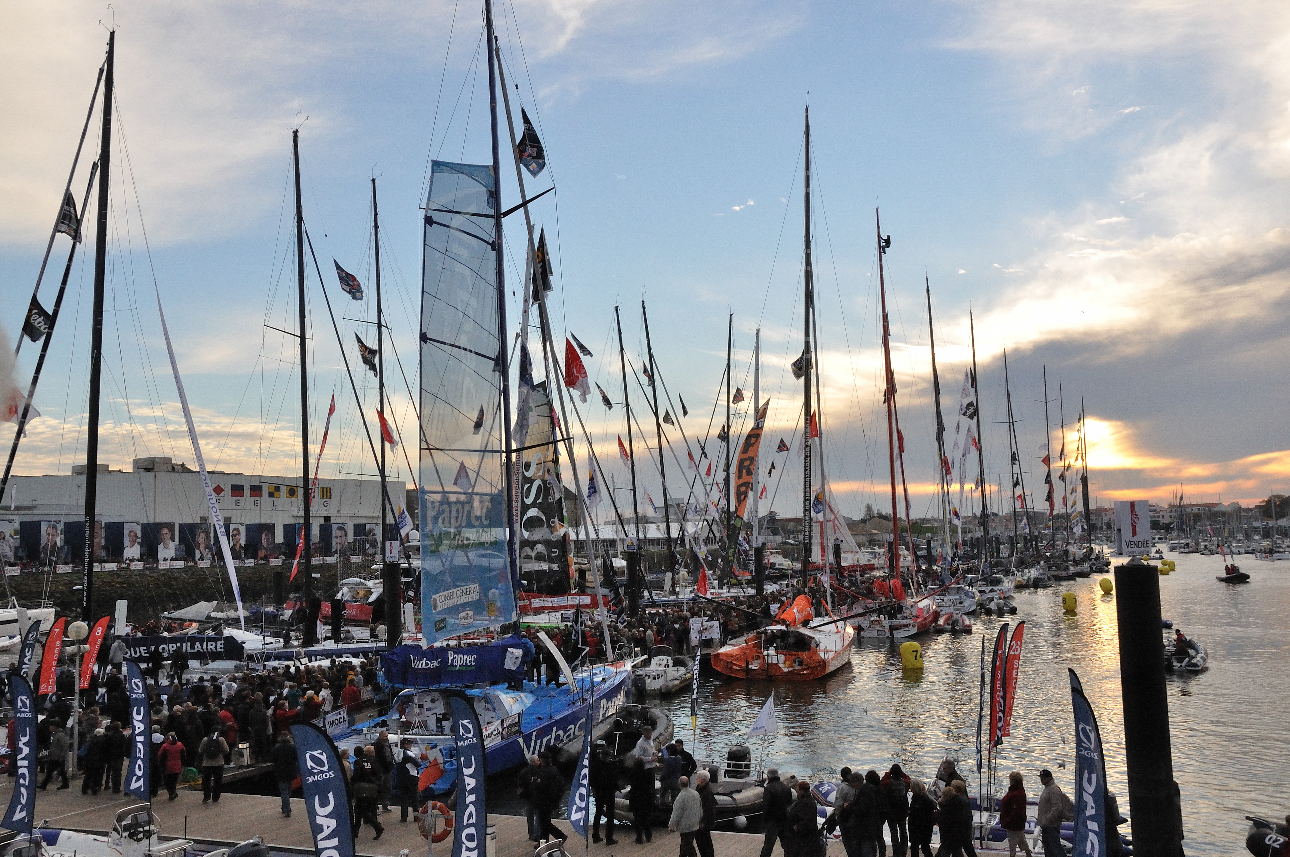 Vendée Globe 2012-2013 : bateaux à quai